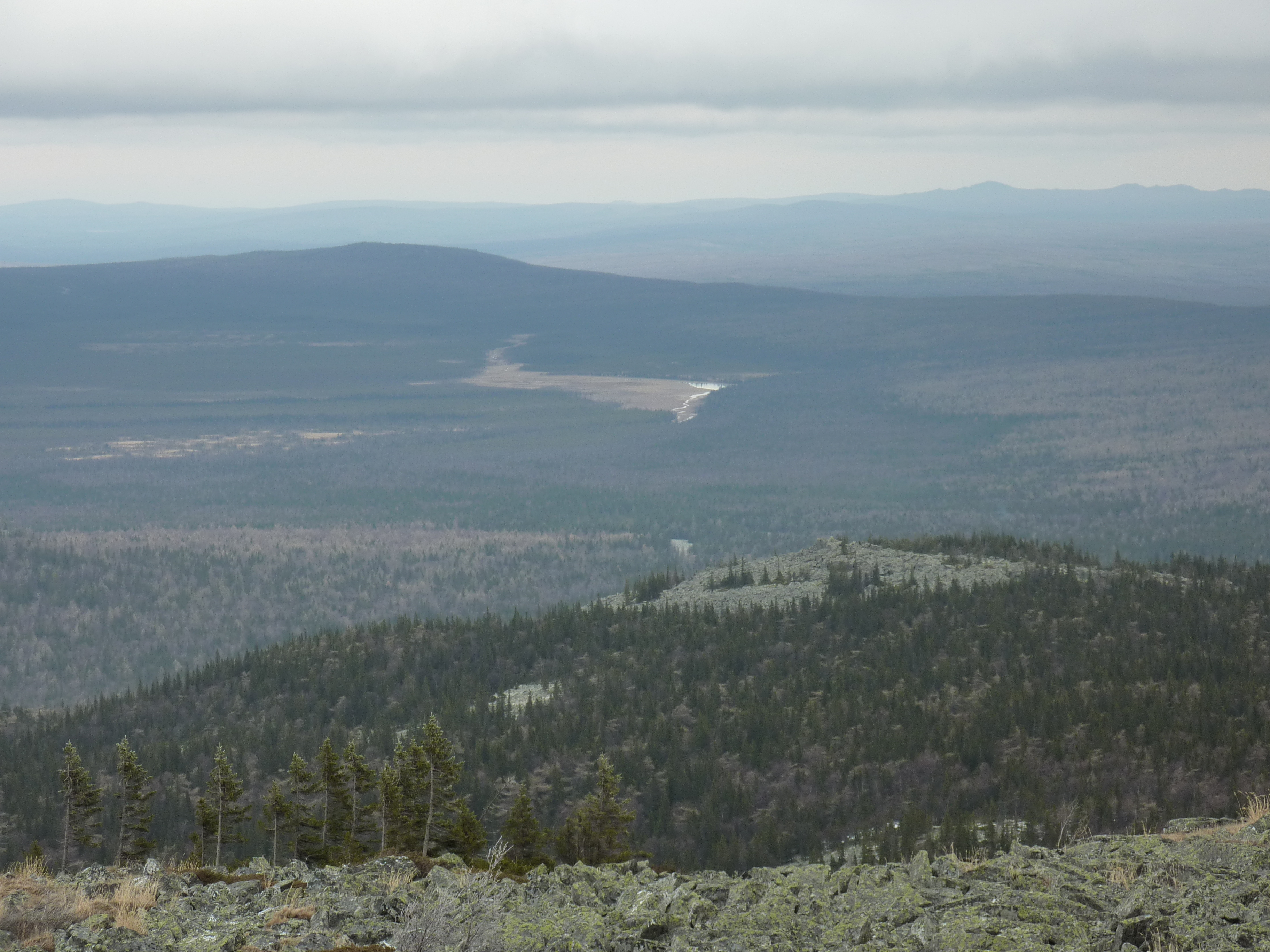 View on Tuluk lake, Bashkortostan, Russia. (Вид на Тюлюкские озёра)